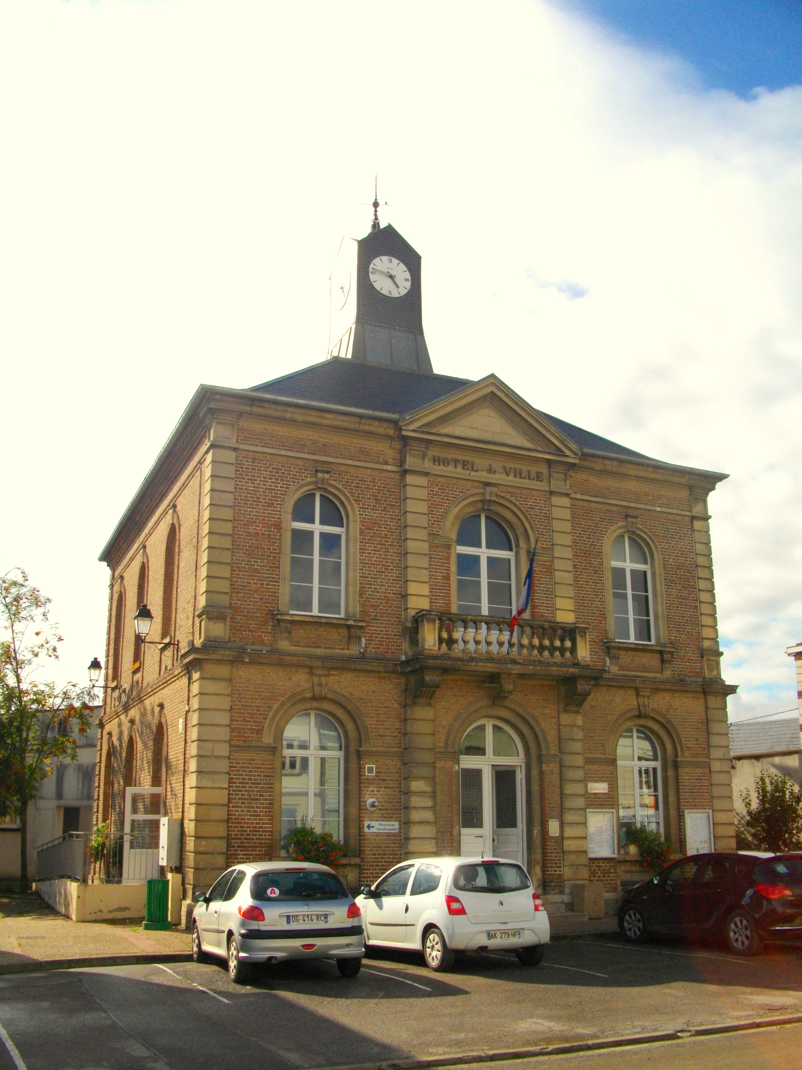 La mairie